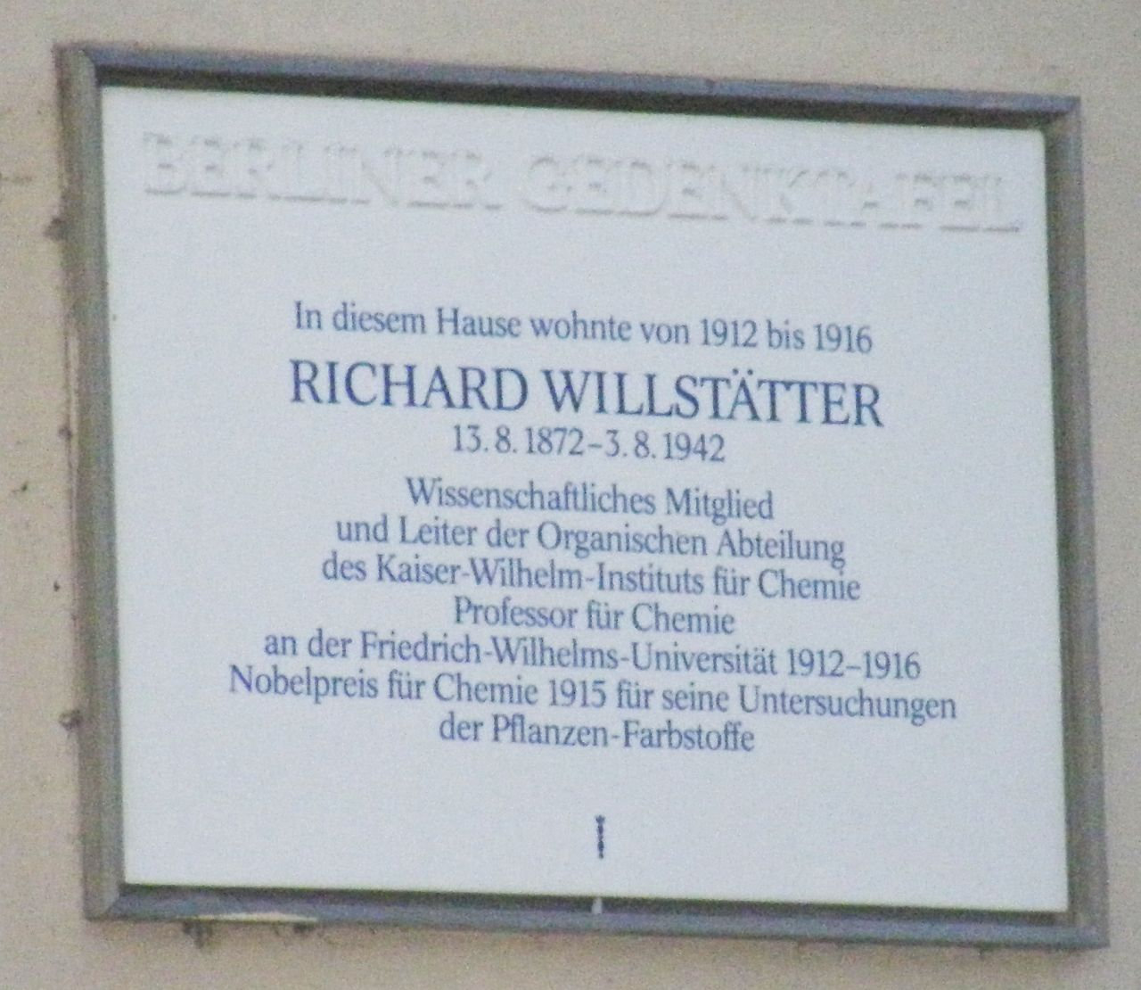 Berliner Gedenktafel für Richard Willstätter. Faradayweg 10, Berlin-Dahlem